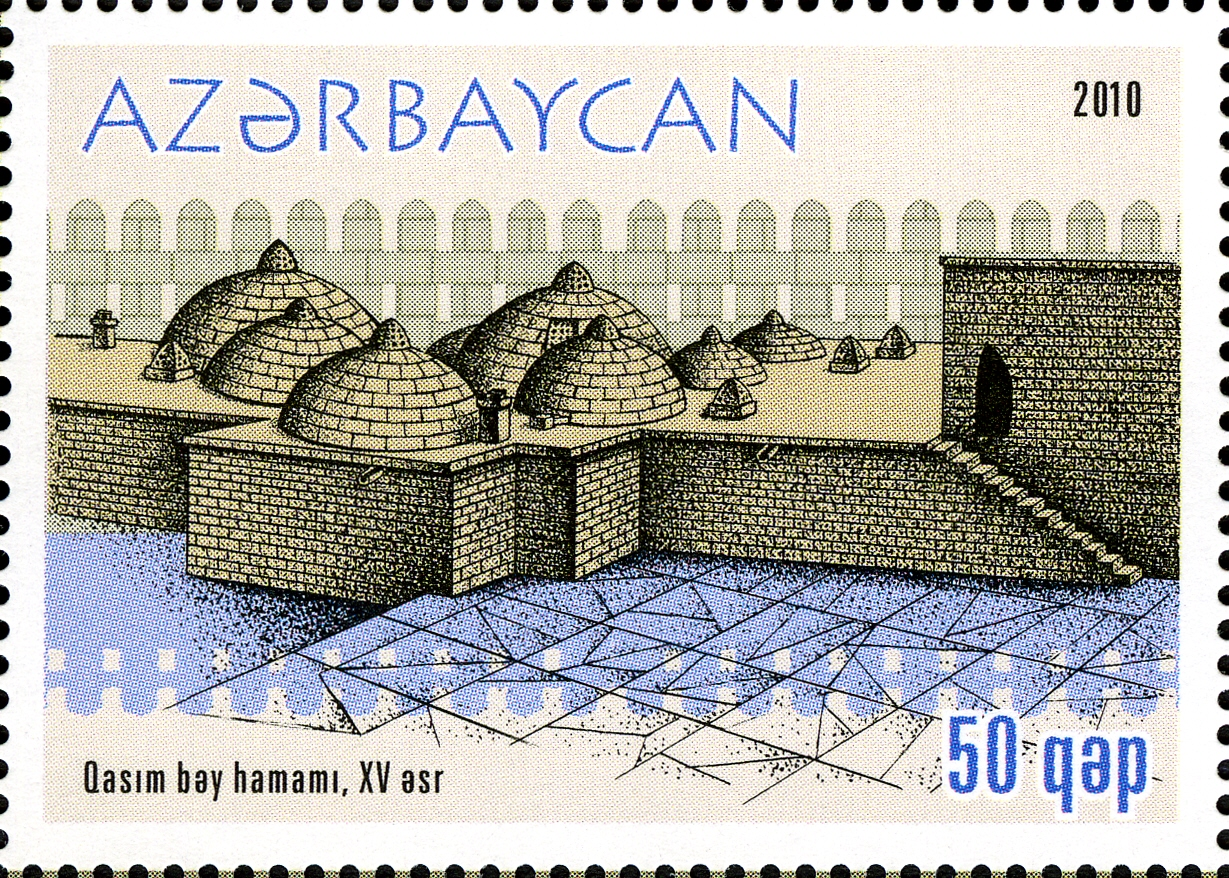 İçəri şəhər